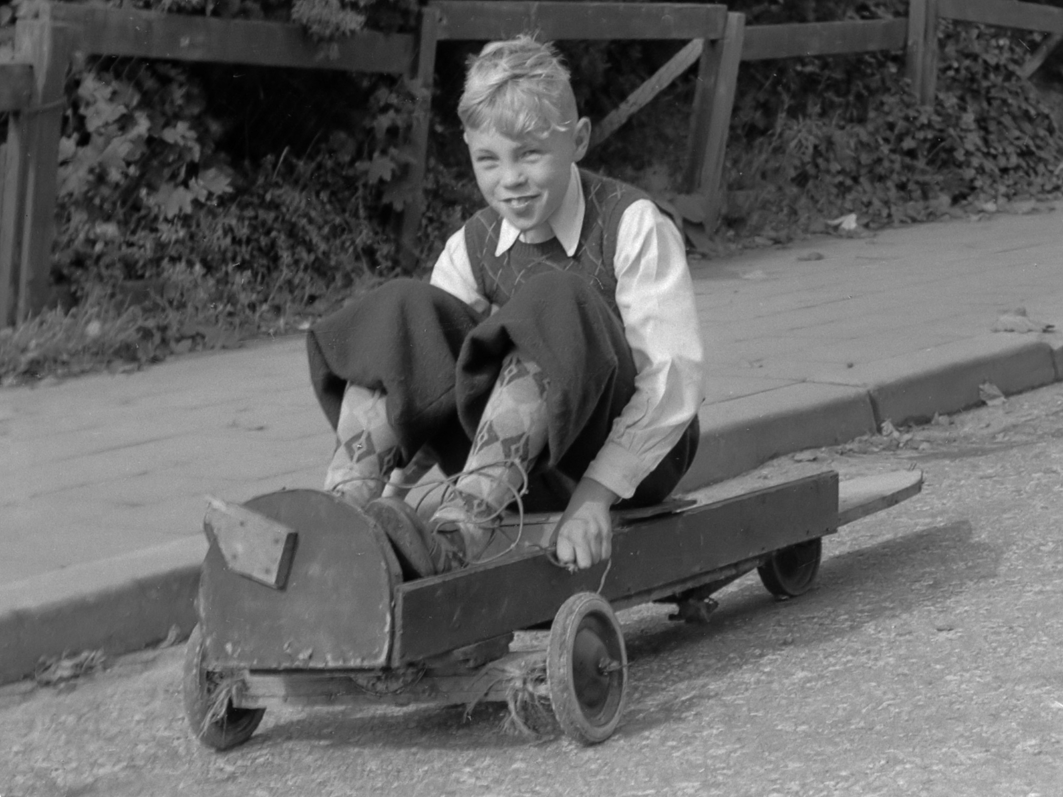 Jongentje in een zeepkist 1950